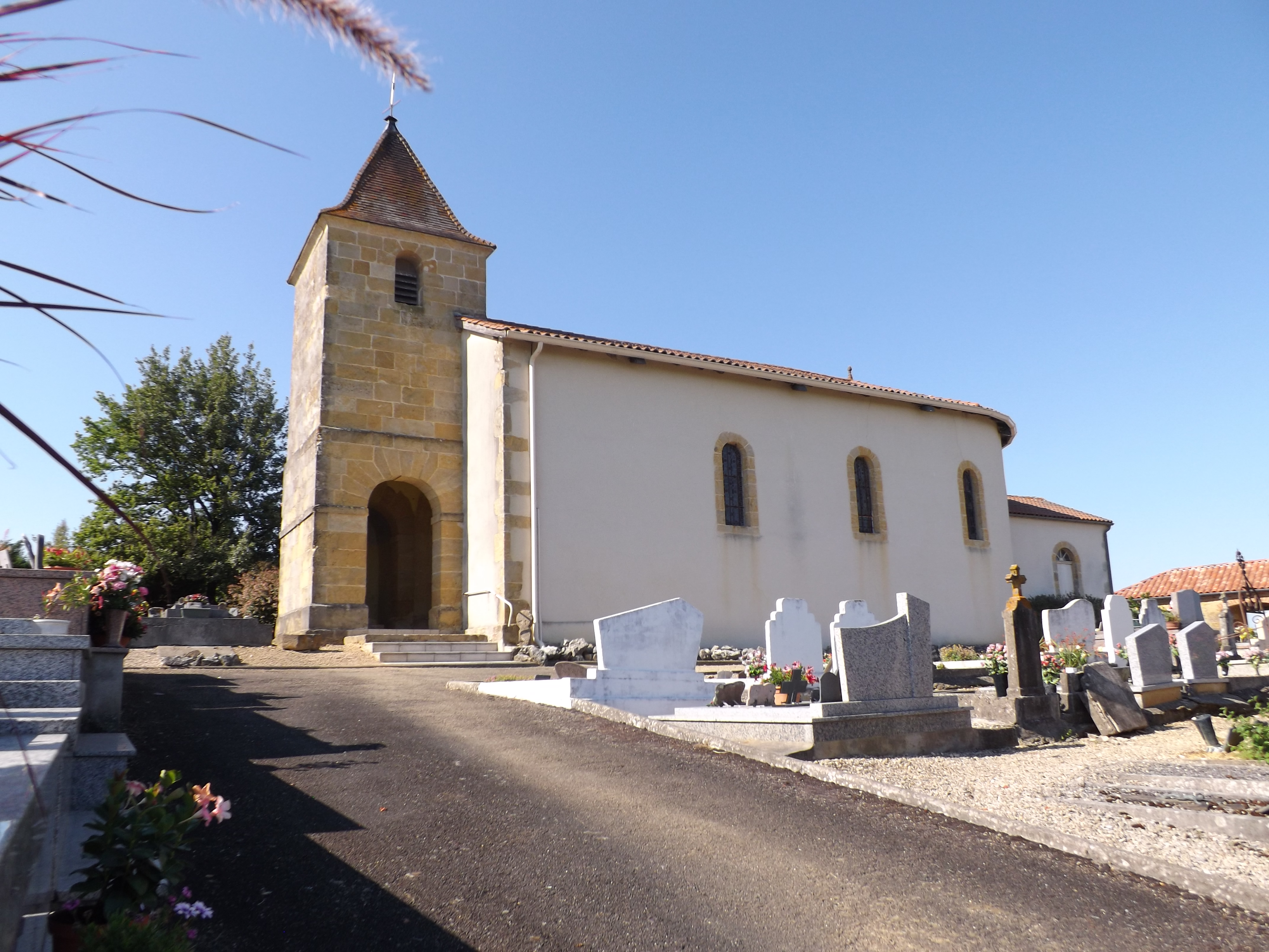 Glèisa de sent Laurenç de Pecorada, Tursan, Gasconha